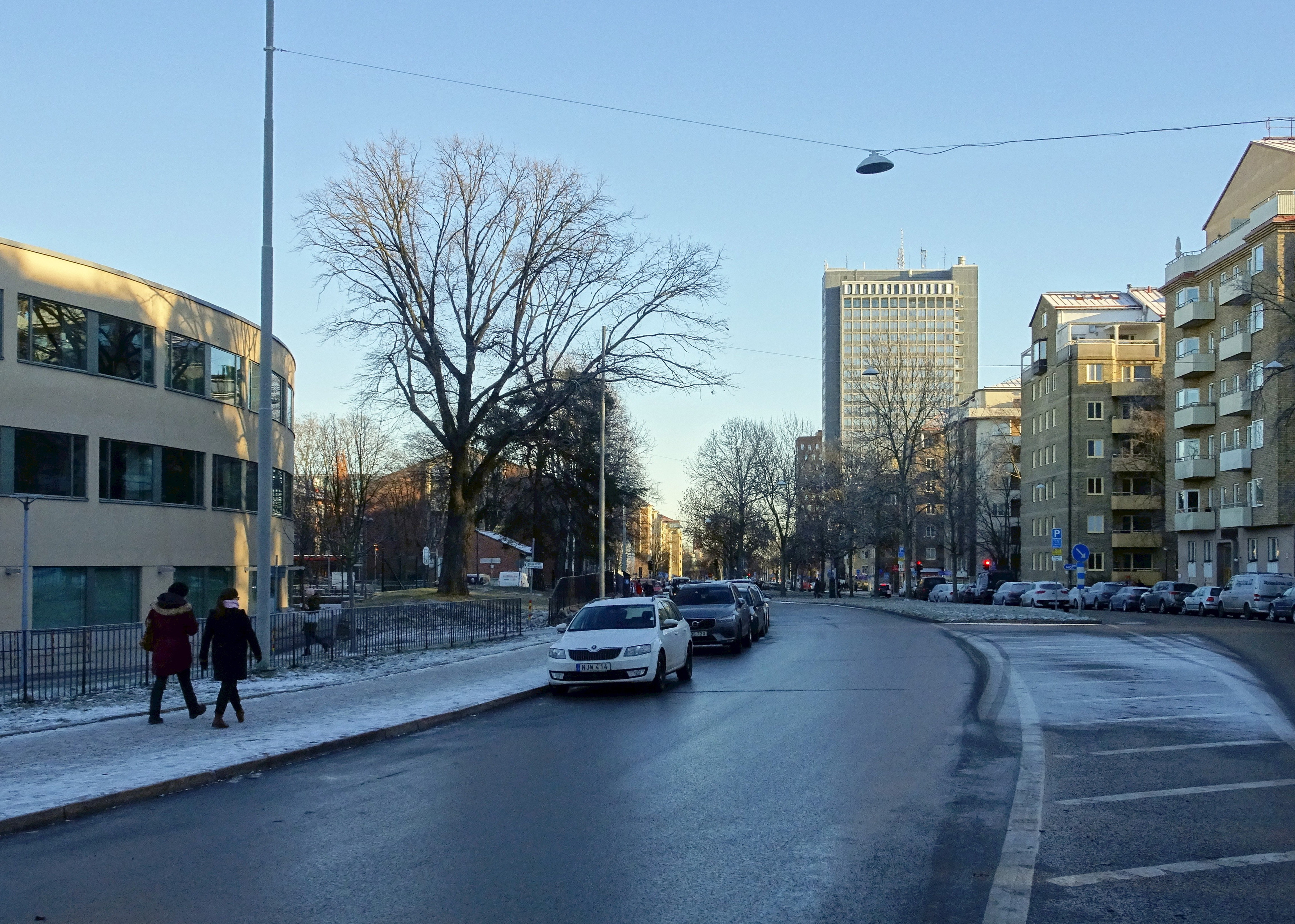 Rålambsvägen med DN-skarpan i bakgrunden